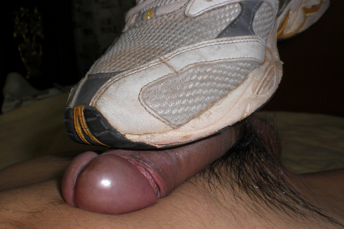 My man penis too fast Told me to wear shoes to step on his penis Stepped on ejaculation